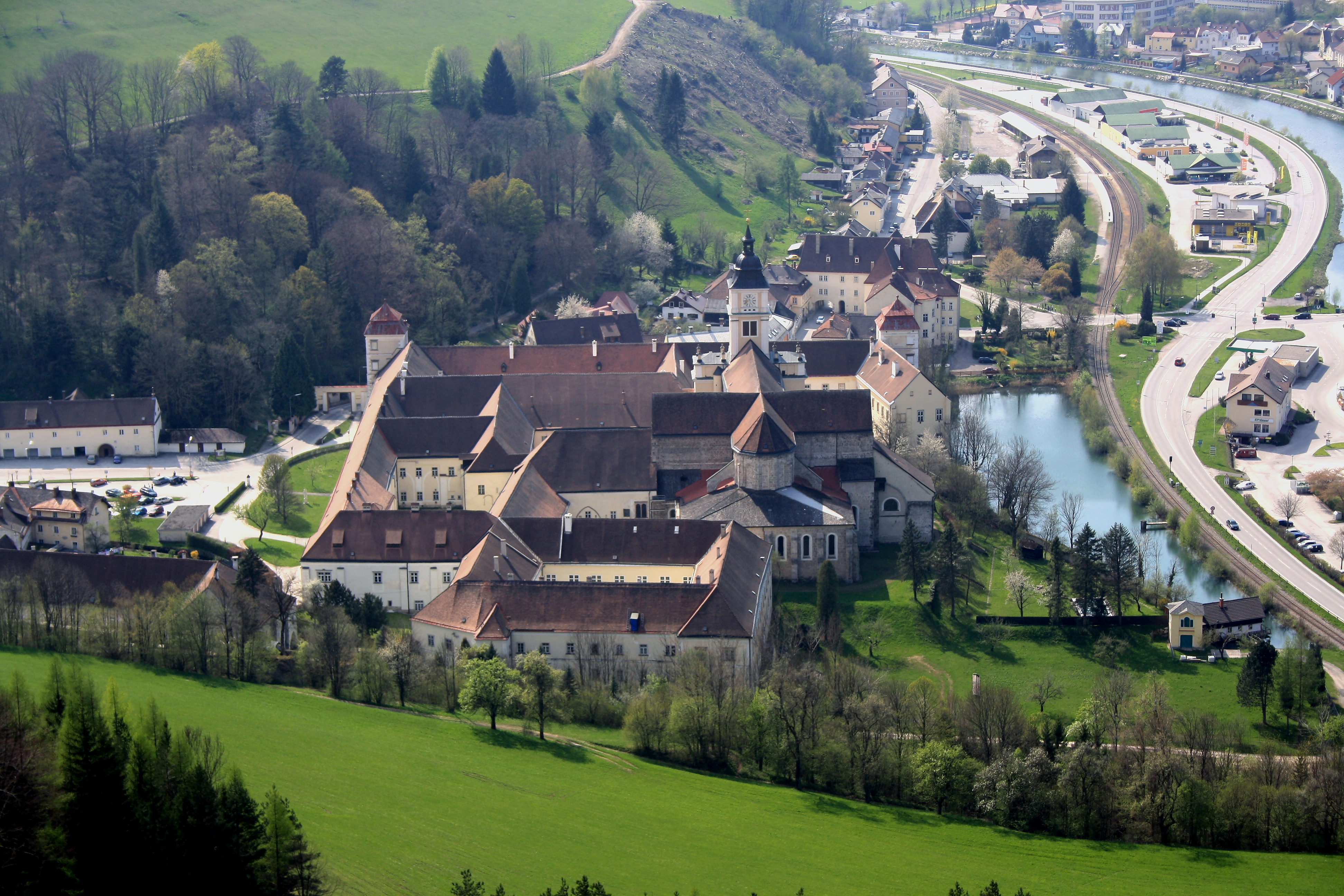 Stift Lilienfeld, Komplex von Osten.